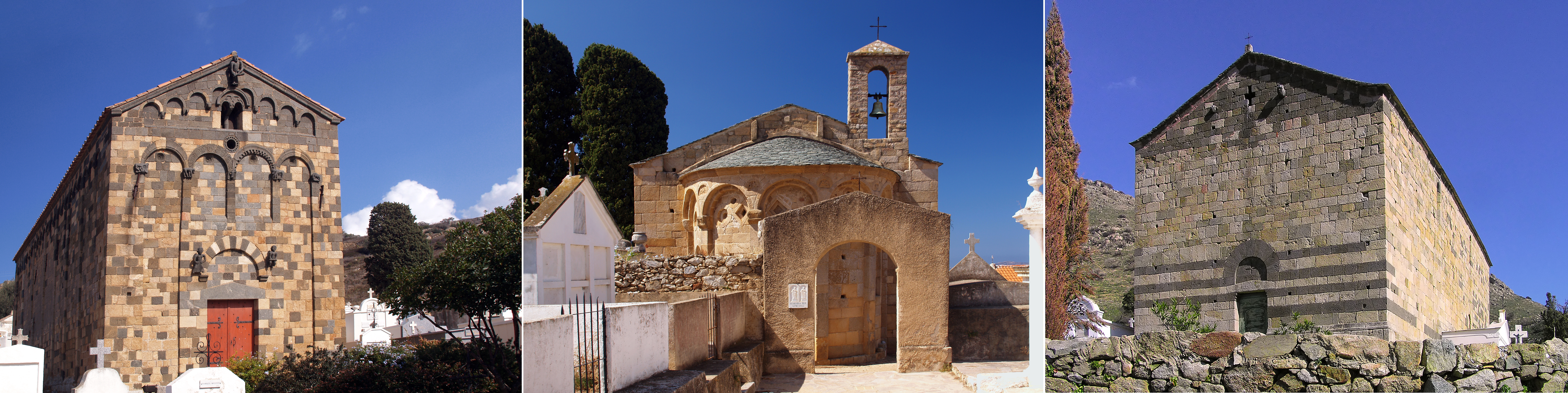 Balagne (Corse) - Trois églises polychromes des XIe et XIIe siècles. De gauche à droite, l'église de la Trinité et de San Giovanni d'Aregno, la chapelle romane Saints Pierre et Paul à Lumio et l'église San Raineru de Lunghignano.